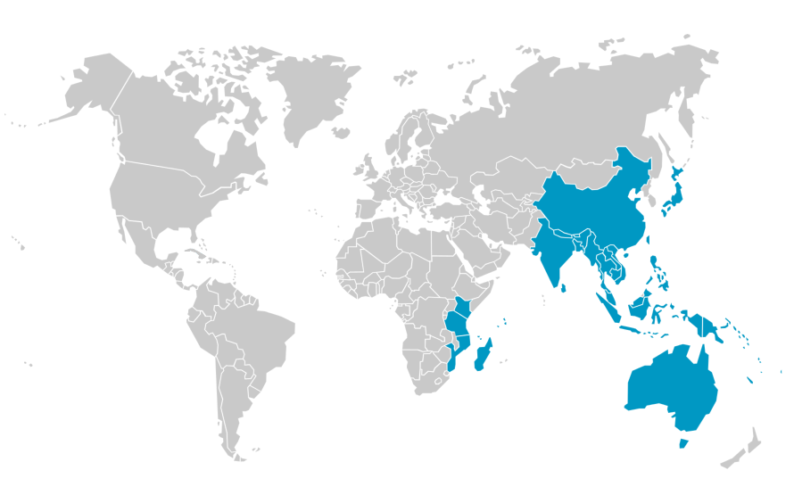 Carte du Monde sur la répartitions des Cycas